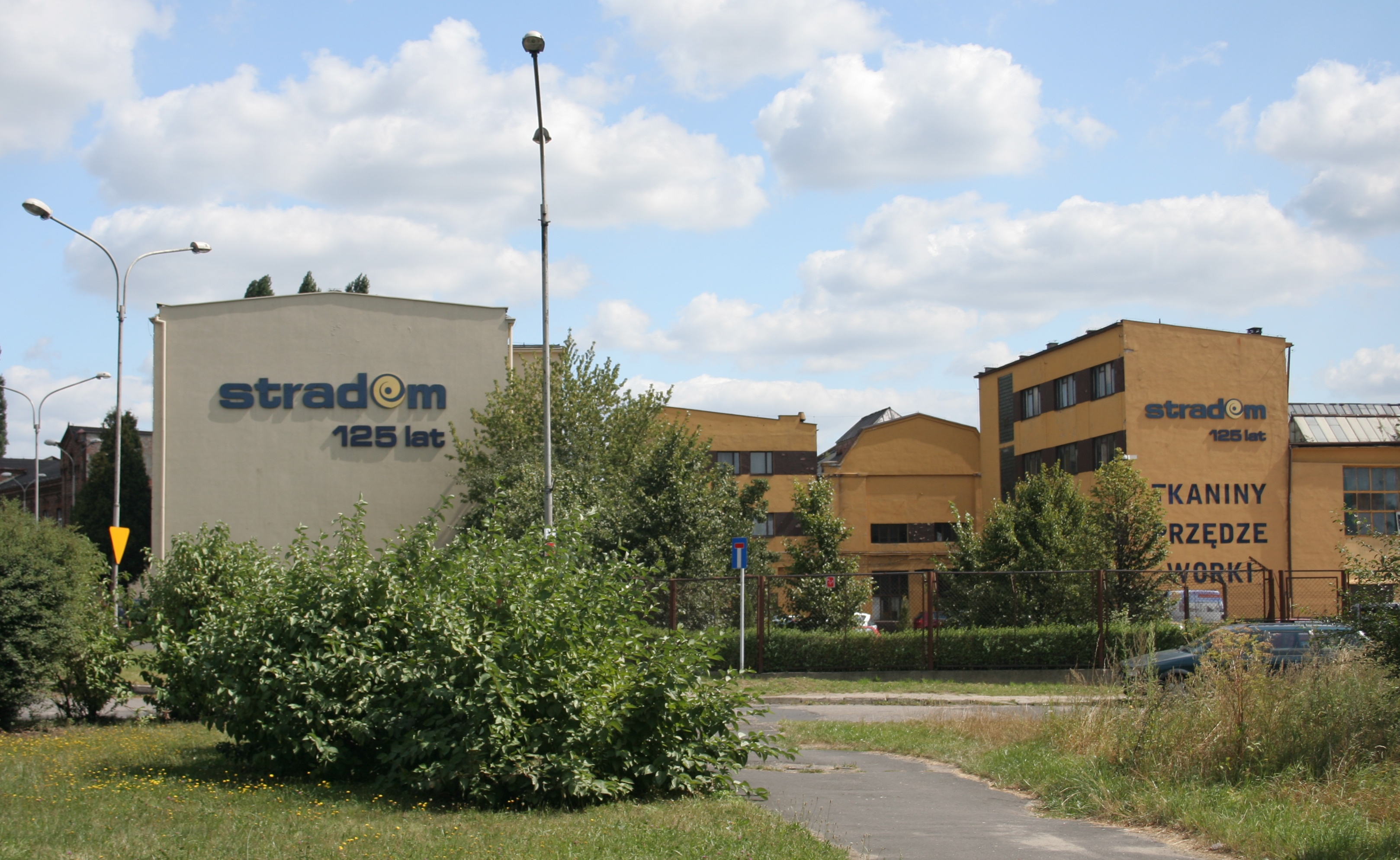 Zakłady włókiennicze na Stradomiu (Częstochowa).